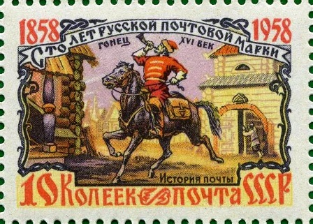 Серия "100 лет русской почтовой марке": Почтовый гонец, многоцветная.